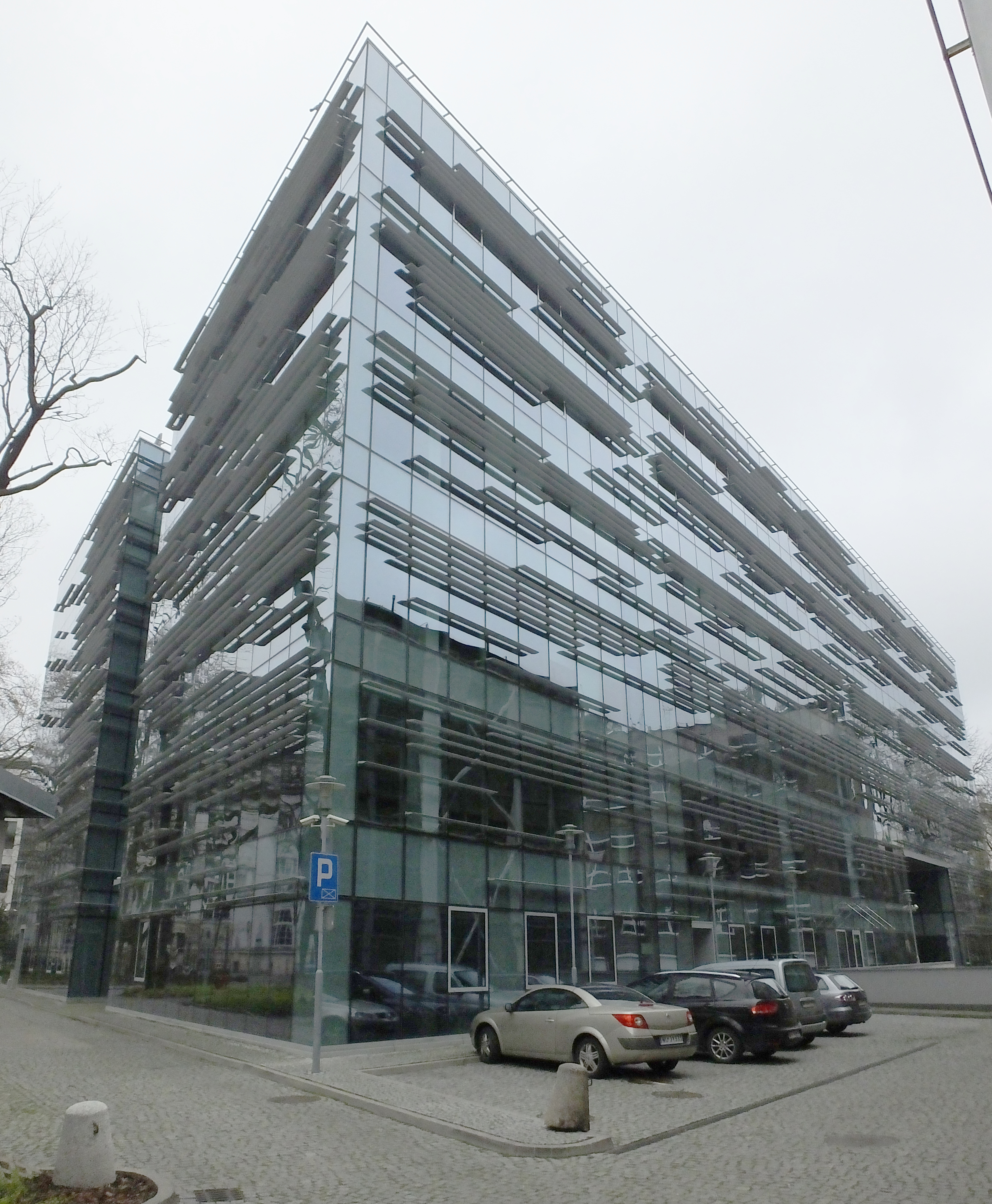 Gmach Wydziału Matematyki i Nauk Informacyjnych, kampus główny Politechniki Warszawskiej